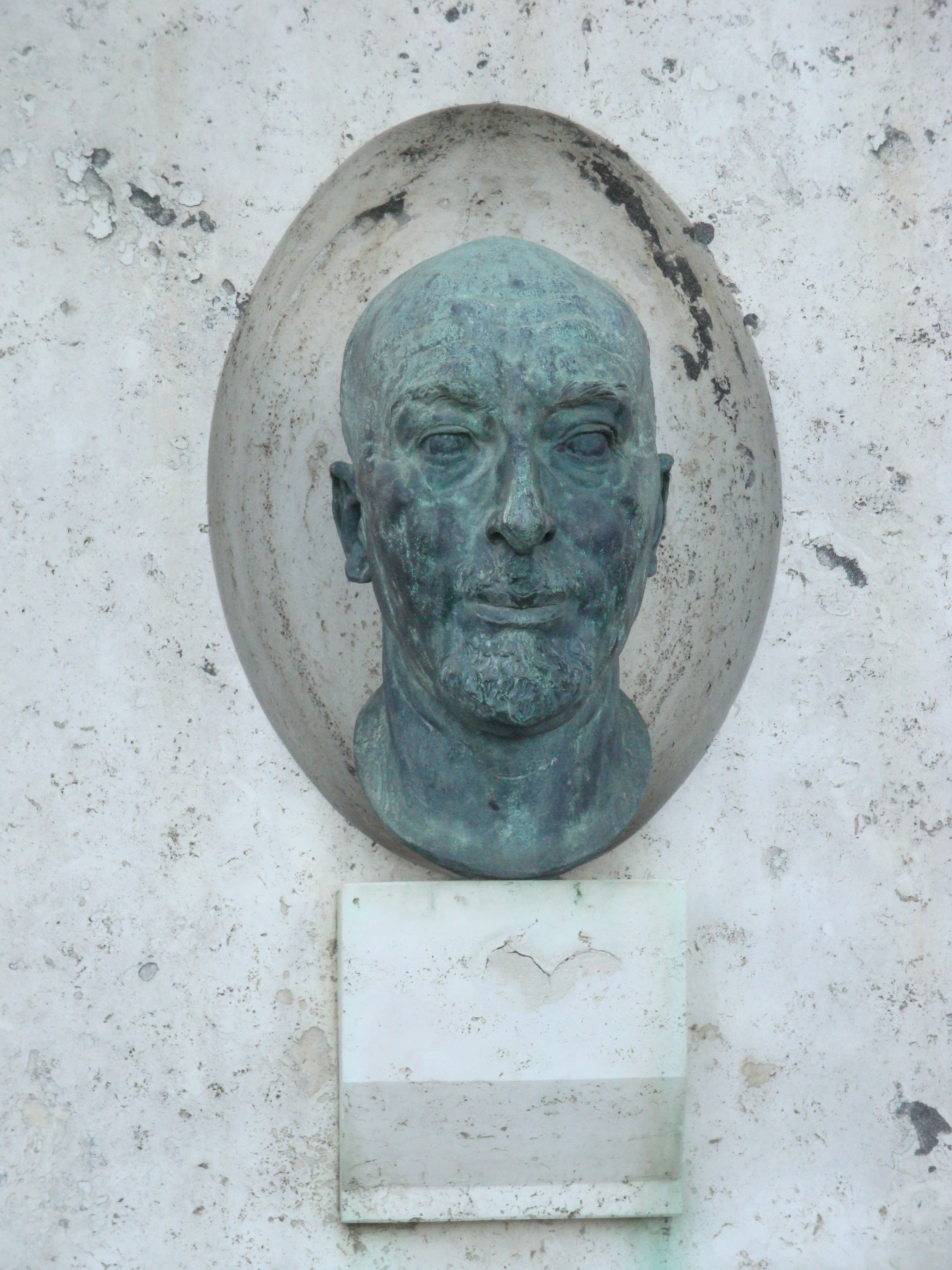 Angiolo Silvio Novaro, Diano Marina, Italia